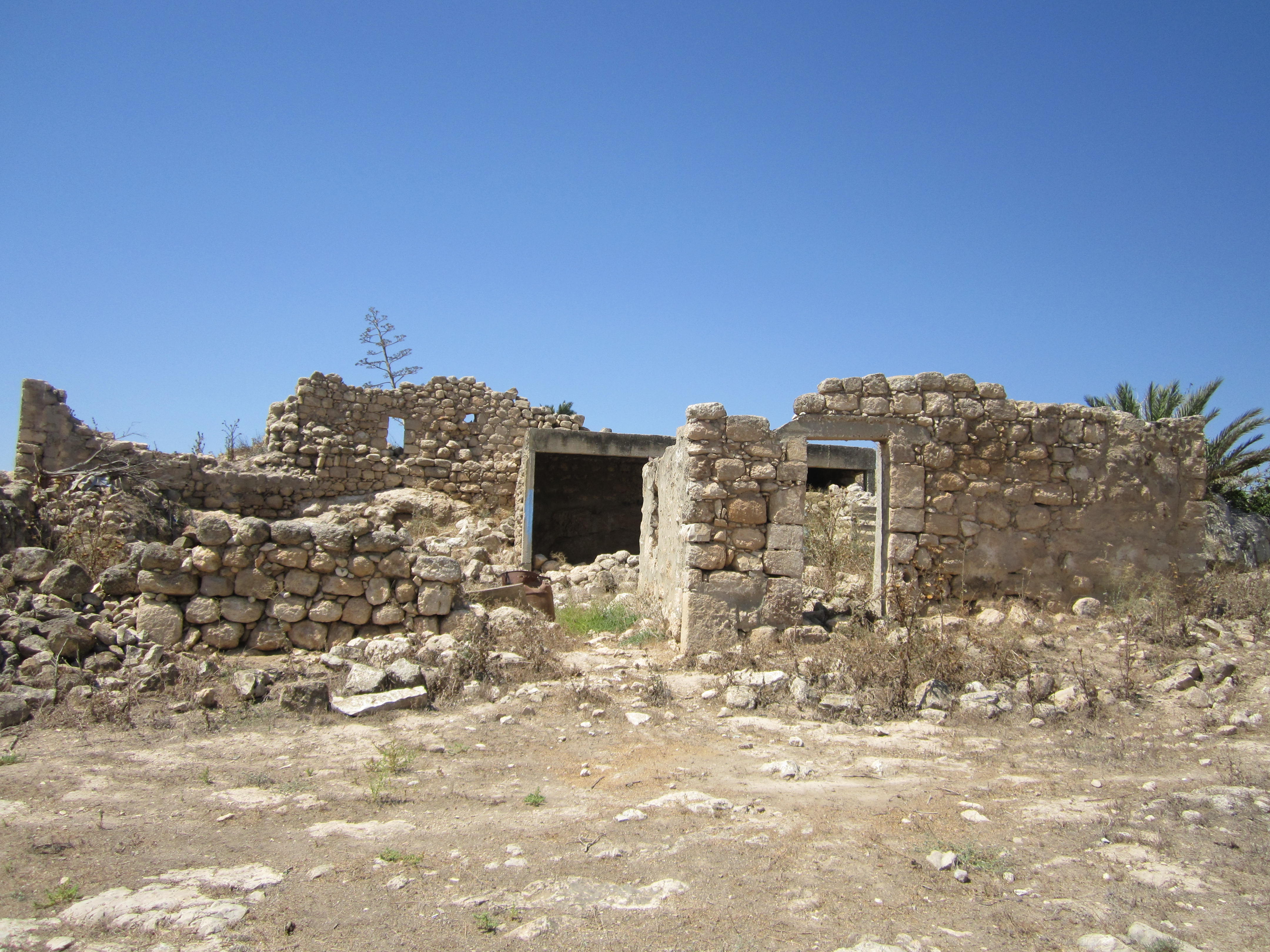 חורבת רומא - רומי